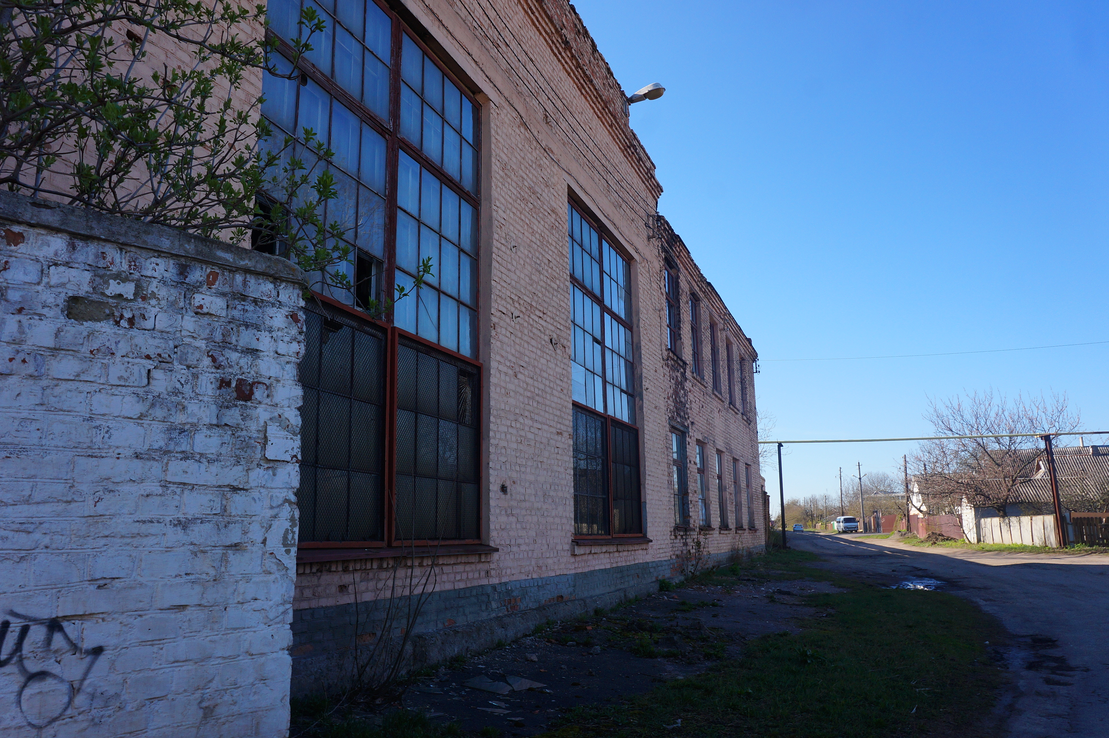 Будинок вагоноремонтного заводу, де перед робітниками виступали Г. І. Петровський, М. І. Калінін, Жмеринка, вул. Щекинська